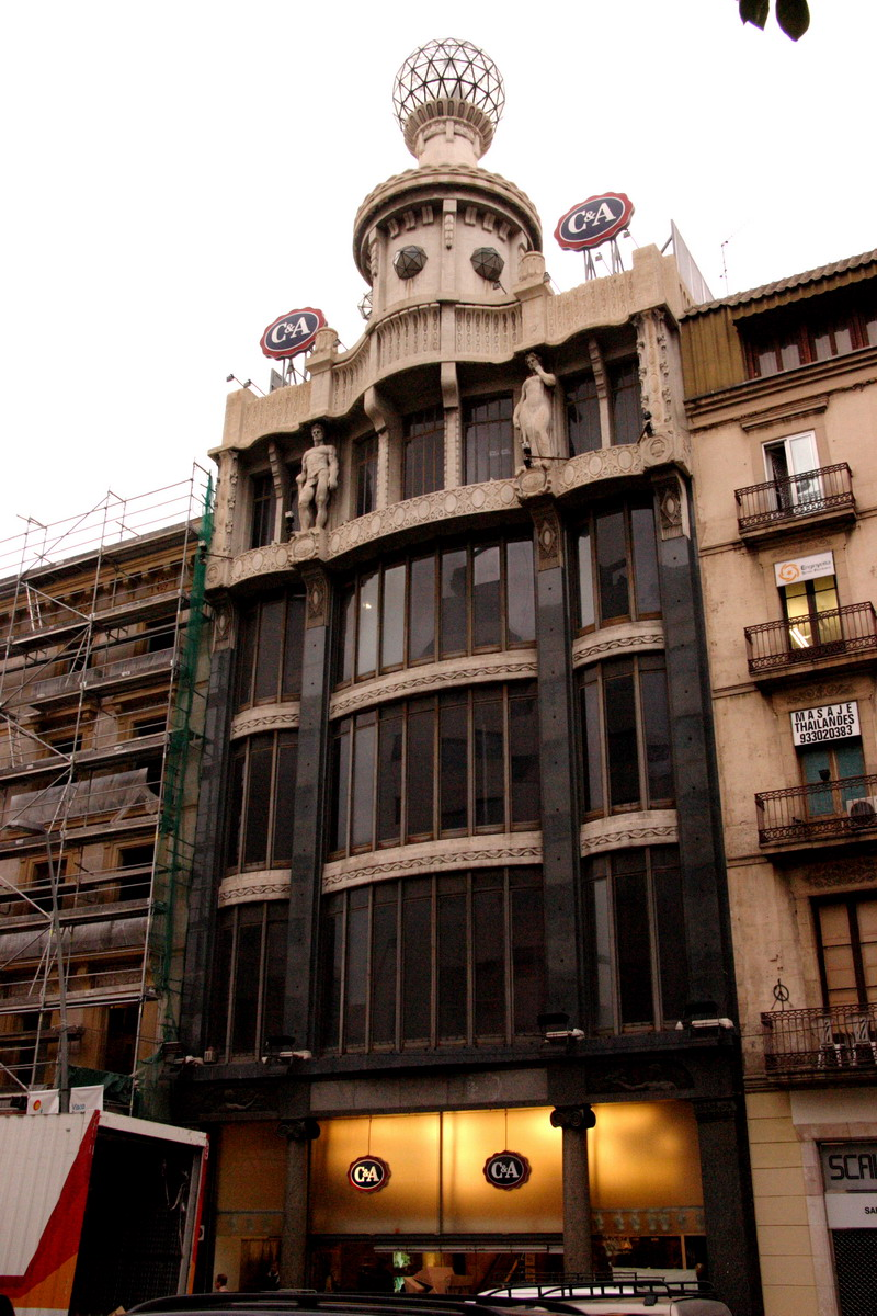 Magatzems Damians (posteriorment “El Siglo”, i actualment CA), c/ Pelai, 54, fets en col·laboració per Eduard Ferrés, Lluís Homs i Ignasi Mas i Morell (1915).